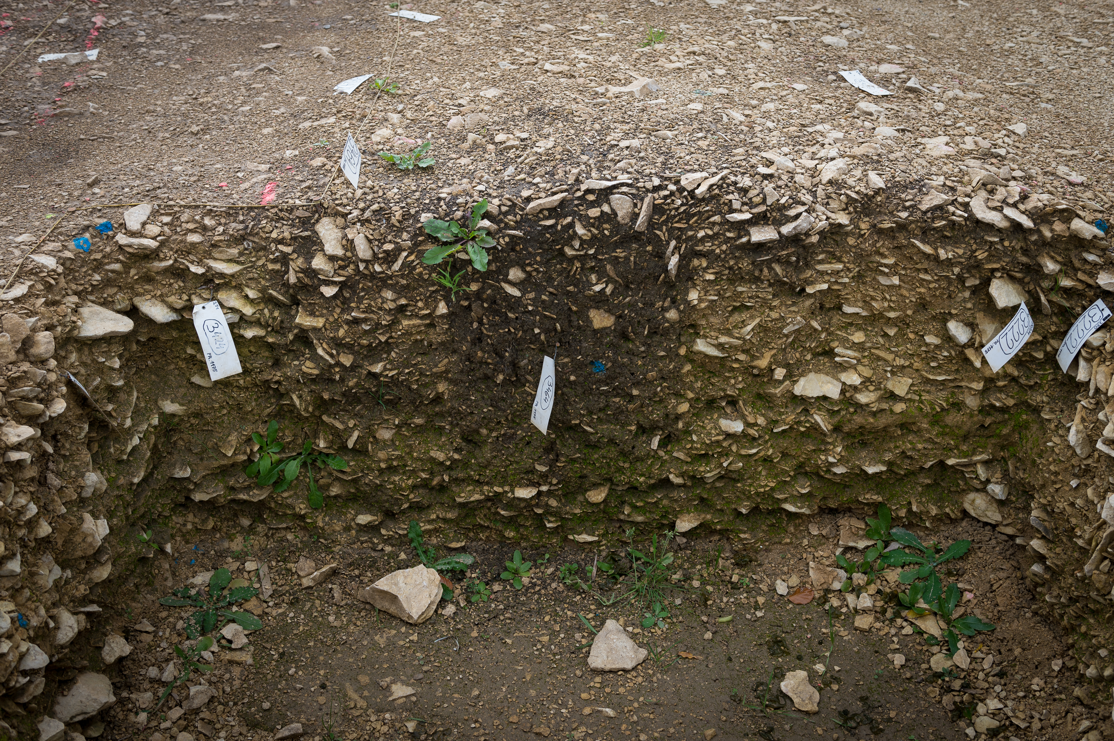 Heidenheim an der Brenz, archäologische Ausgrabungen im Gewann Fürsamen.